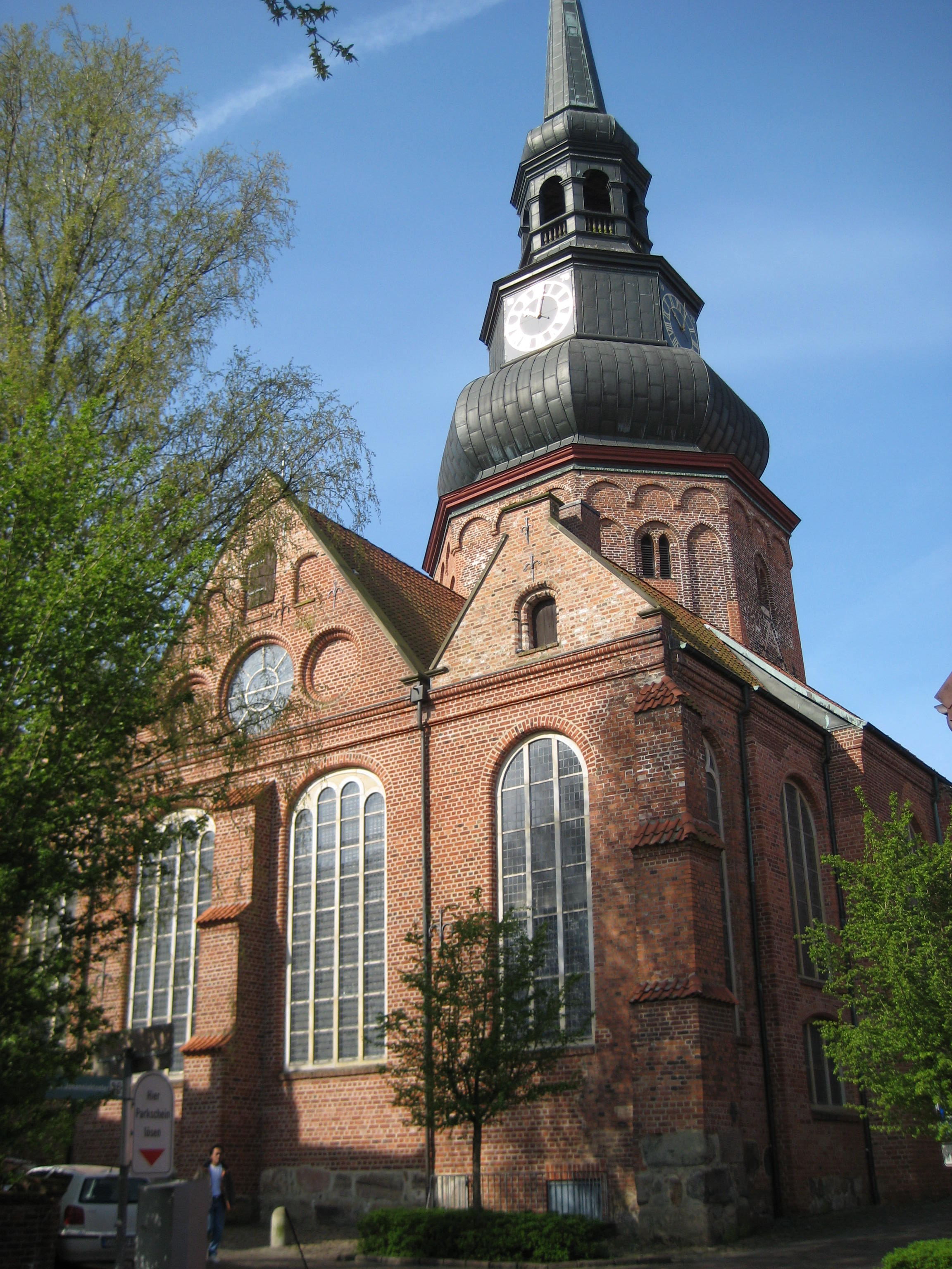 Stade, St. Cosmae et Damiani